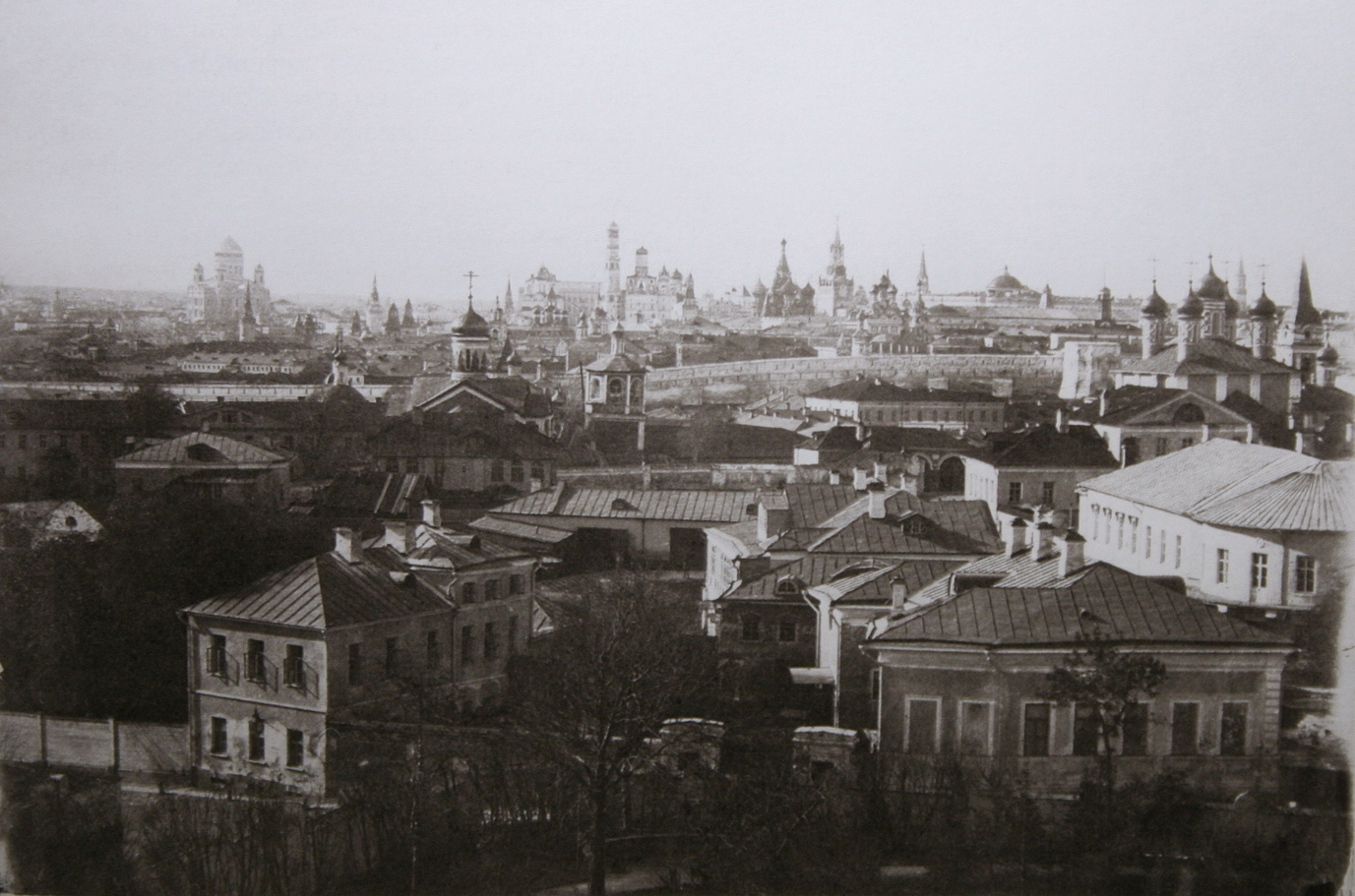 Благодаря неповторимому рельефу Ивановской горки с площадки Морозовского сада открывался неповторимый вид на Московский Кремль и Ивановский монастырь.